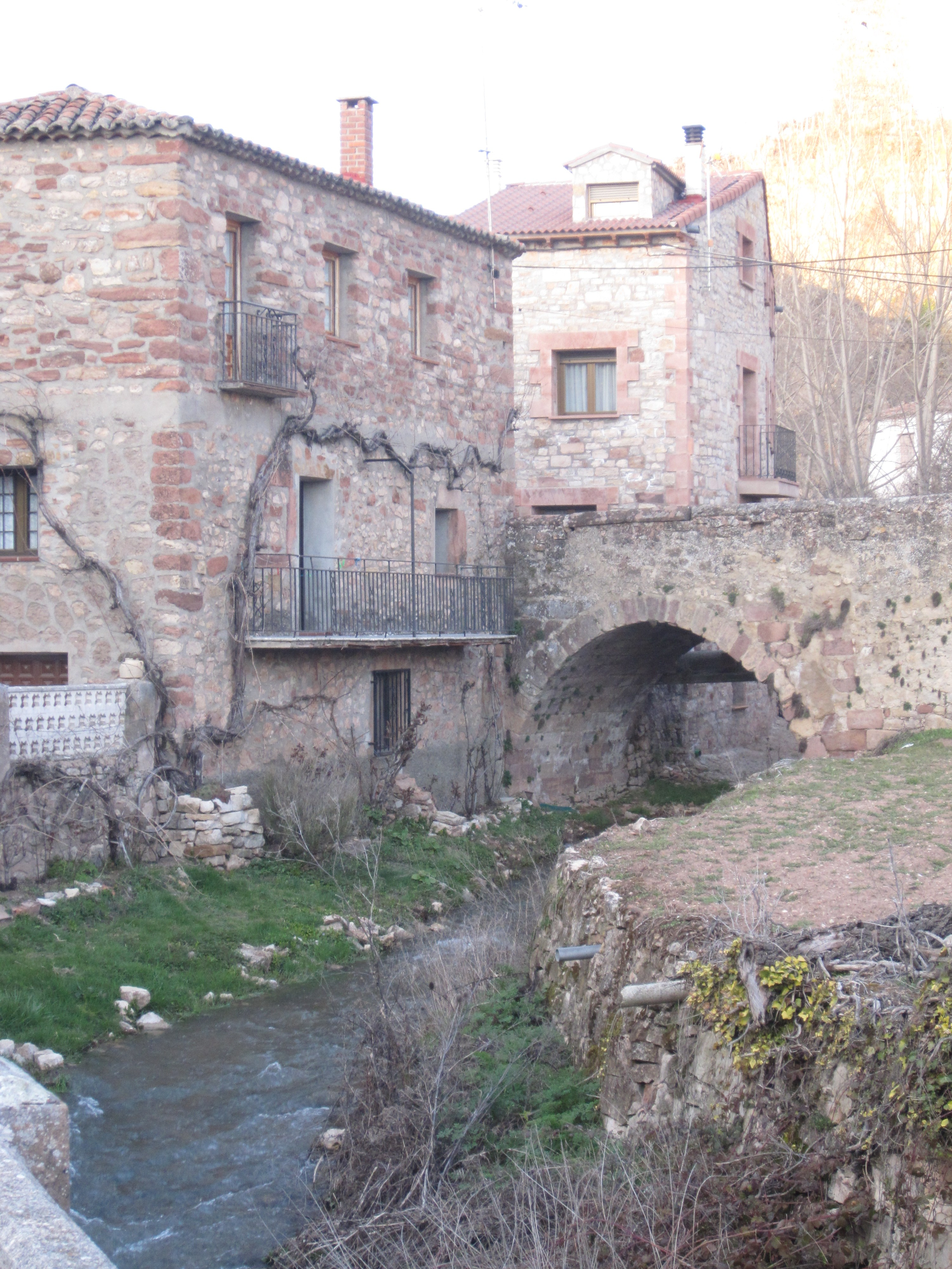 Vista del río Tajuña a su paso por Anguita (Guadalajara). Puente del Canto.